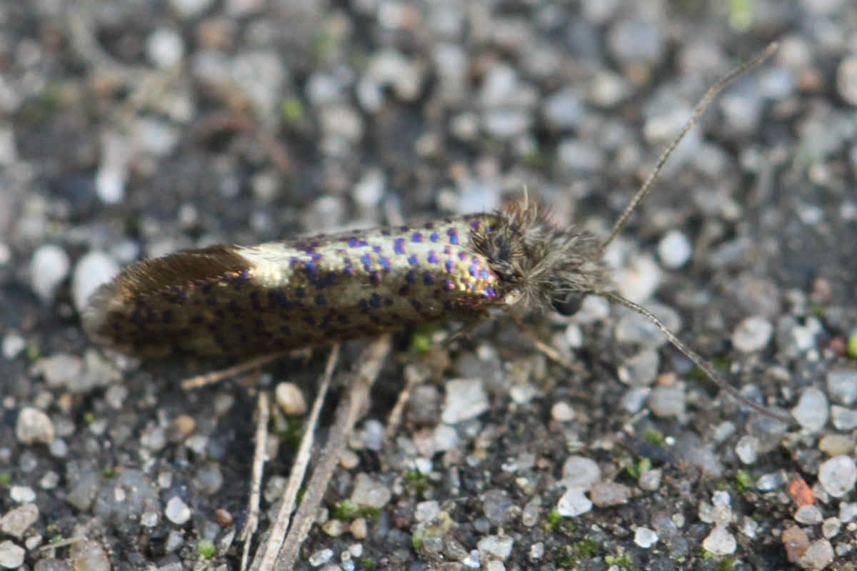 Dyseriocrania subpurpurella am 4.4.2017 in der Schwetzinger Hardt